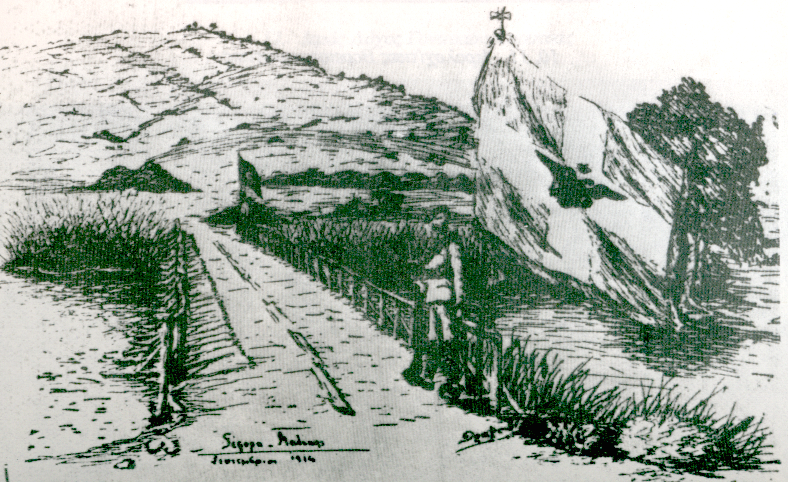 Συνοριακό φυλάκιο μεταξύ Αλβανίας και Βορείου Ηπείρου στη λίμνη Μαλίκη